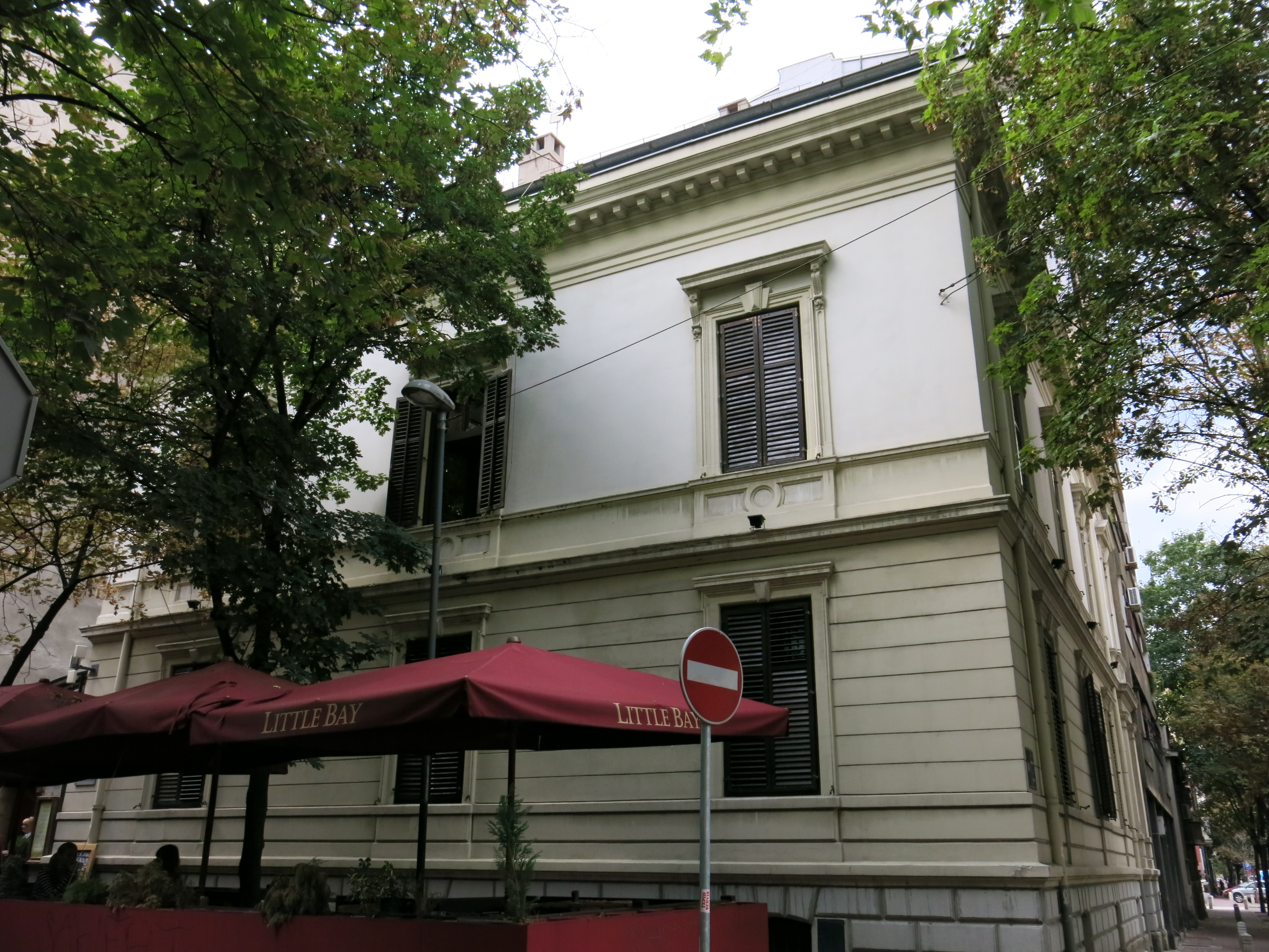 Кућа Стевана Каћанског